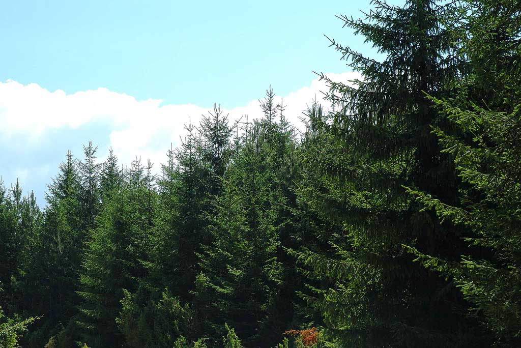 Српски (ћирилица): Панчићеве оморике на Тари